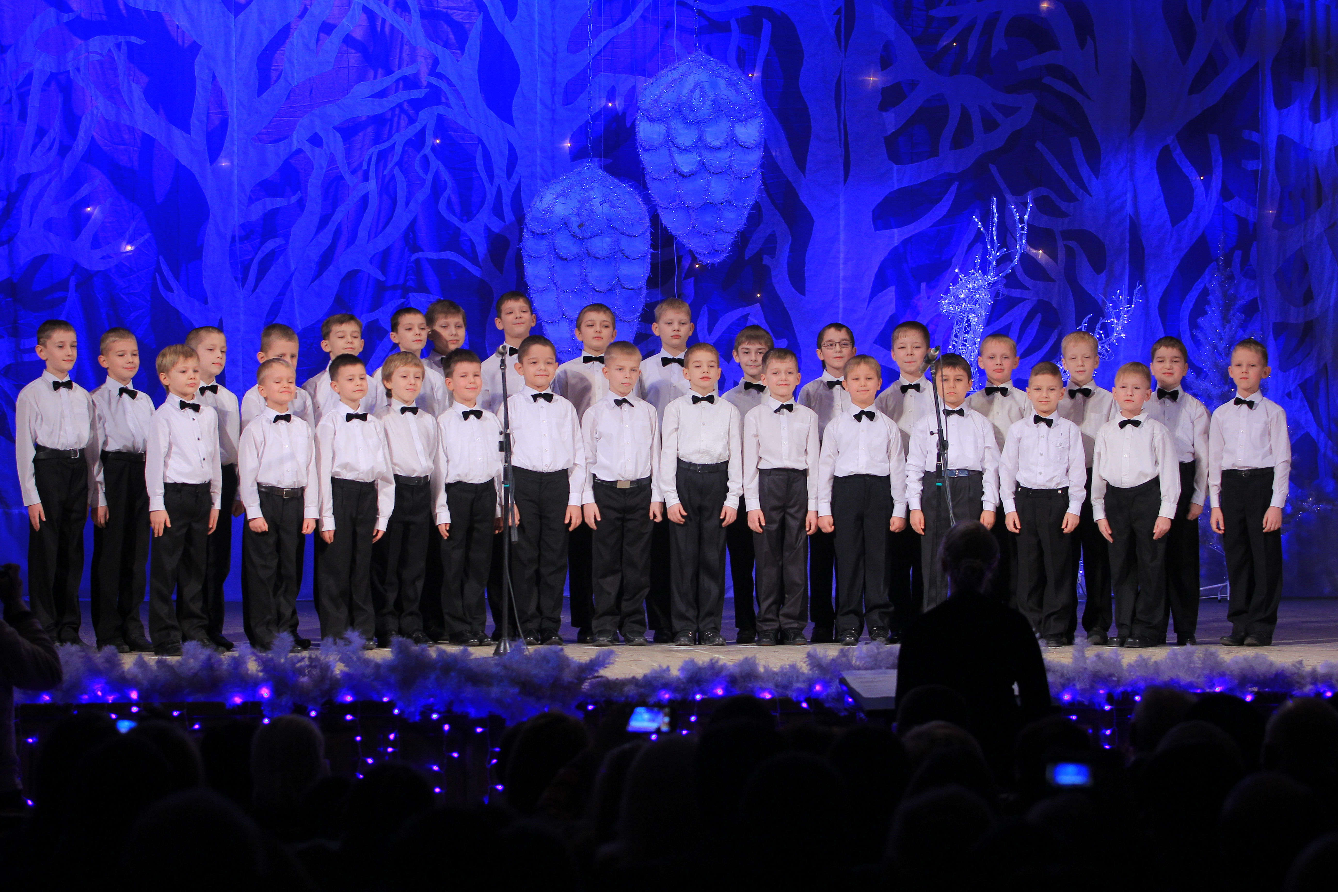 Студія "Концертний хор хлопчиків". Перший виступ.